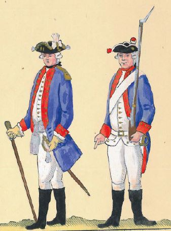 70. 2 Regiment Pieszy Buławy Polnej Litewskiej